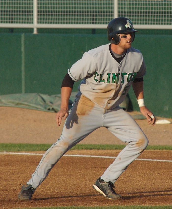 Craig Gentry